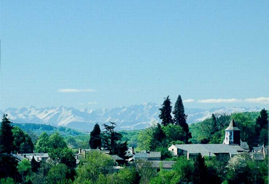 panoramique